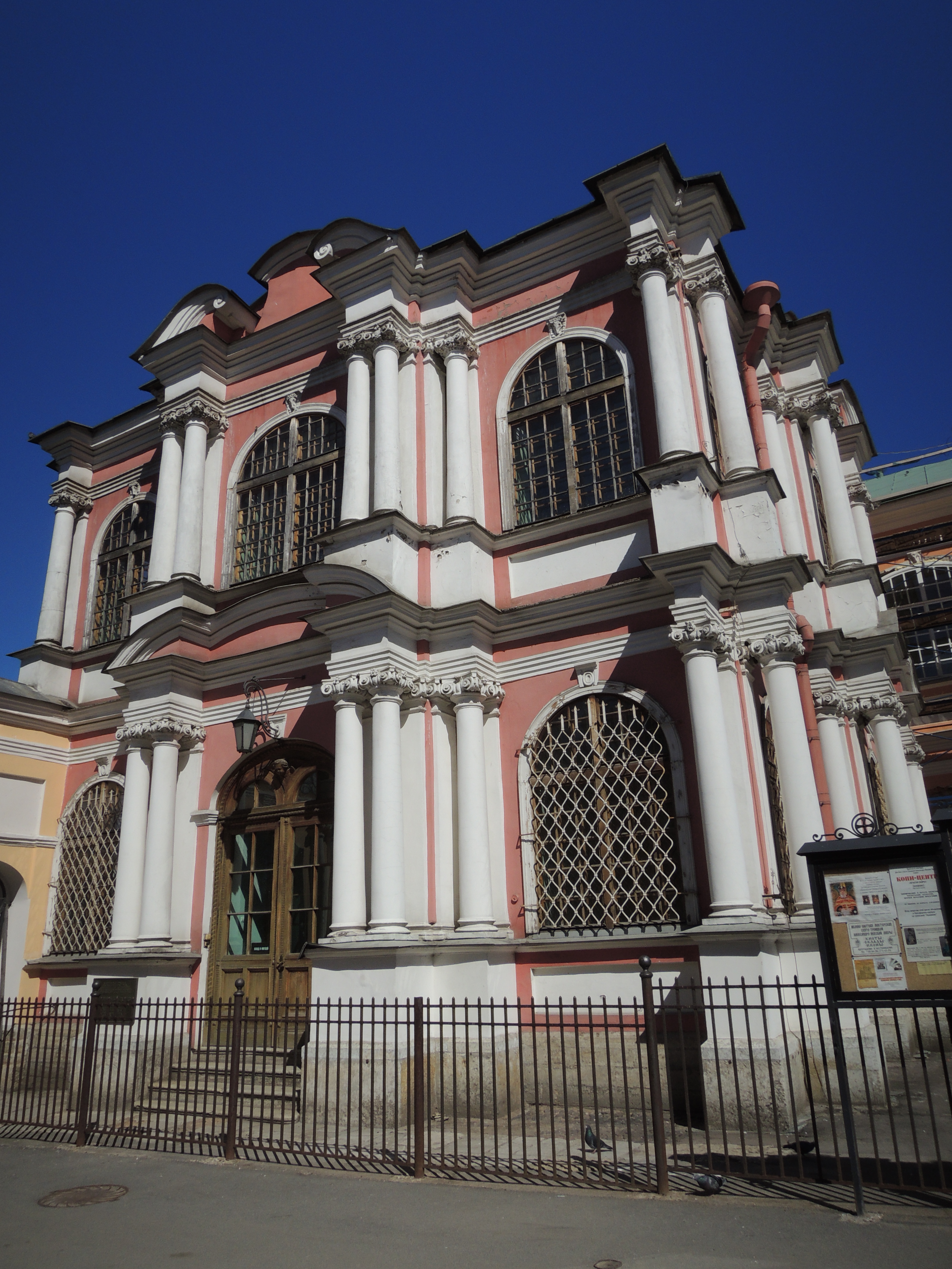 Благовещенская церковь Александро-Невской лавры